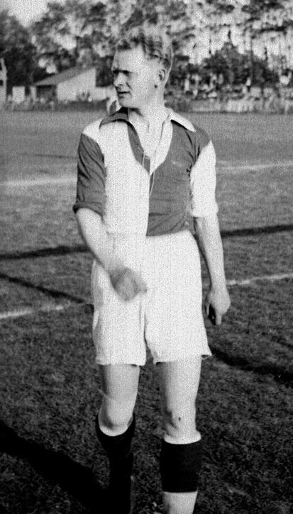 Polski piłkarz Jan Pająk w barwach Lechii Lwów podczas meczu z TS Wisła Kraków